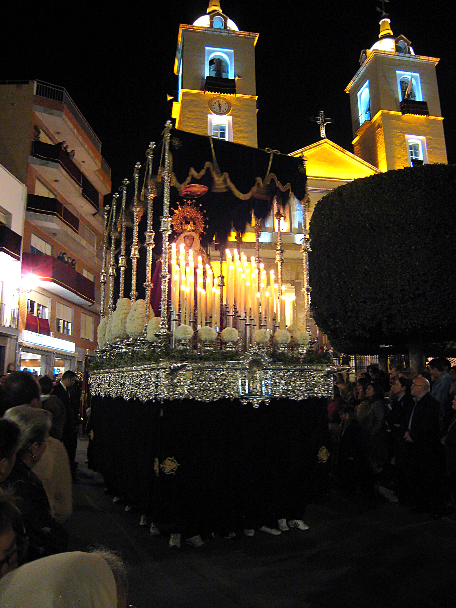 Cofradía del Cristo de la Buena Muerte y María de la Amargura